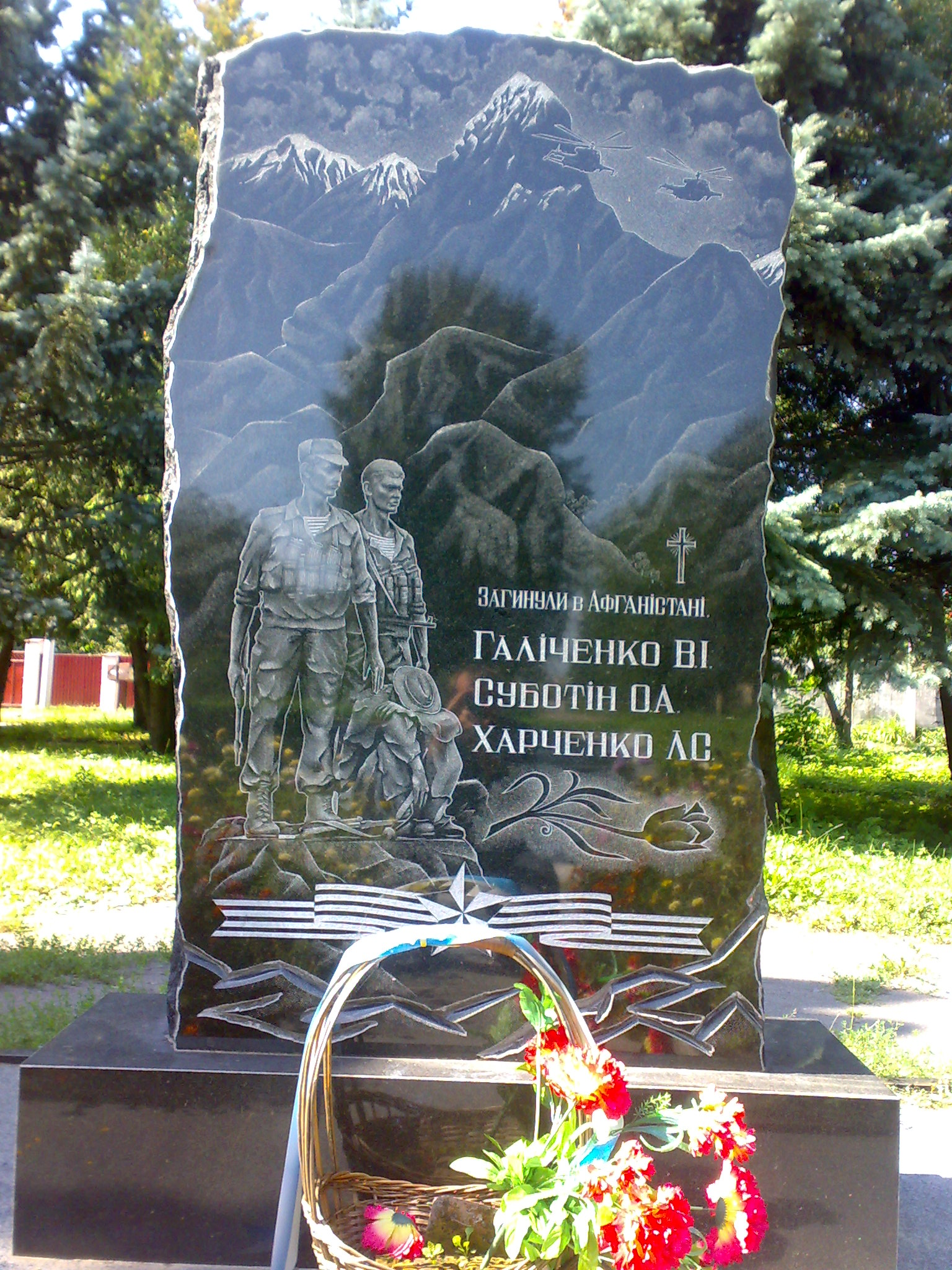 Пам'ятник воїнам-інтернаціоналістам у Миронівці